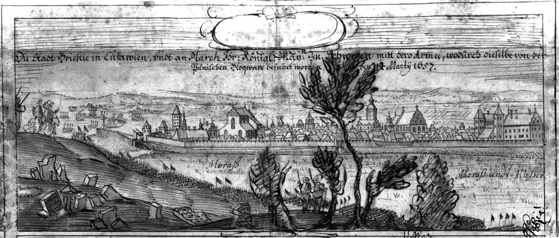 Panorama of Brzesc Kujawski, 1657